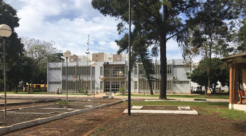 Foto da prefeitura de Horizontina.